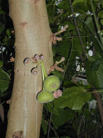 Figowiec pospolity